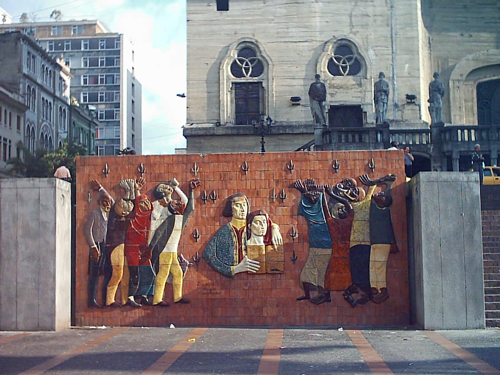 Mural del Maestro Guillermo Botero Gutierrez at Plaza de Bolivar. Manizales, Colombia.